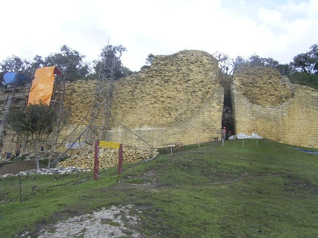 selbst fotografiert, gemeinfrei